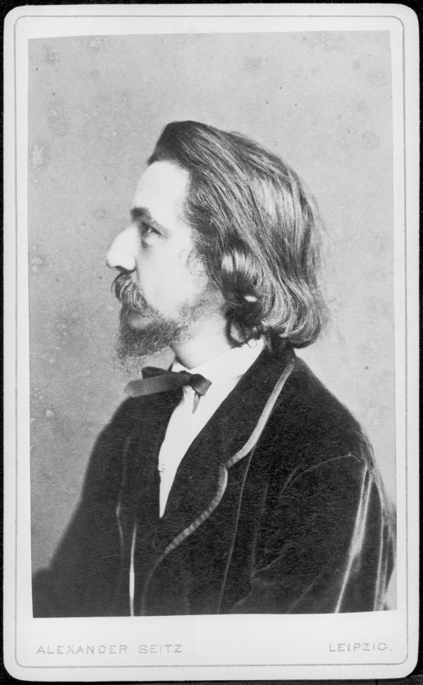 German composer Franz von Holstein (1826-1878)